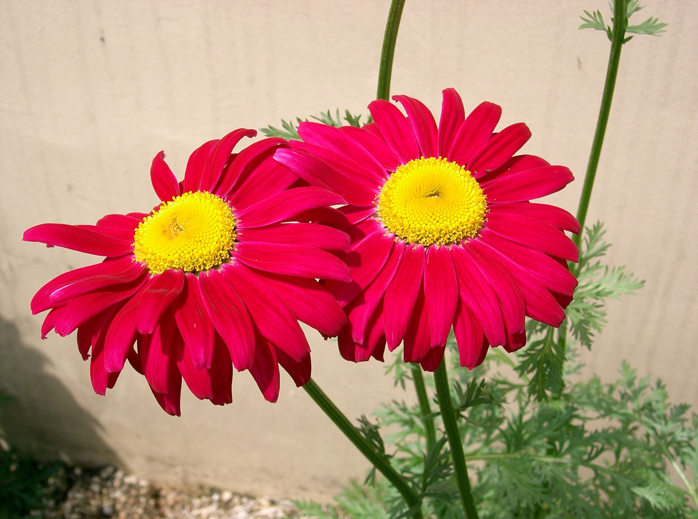 Tanacetum coccineum